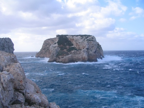 Isola Piana in Inverno con mastrale forza 9